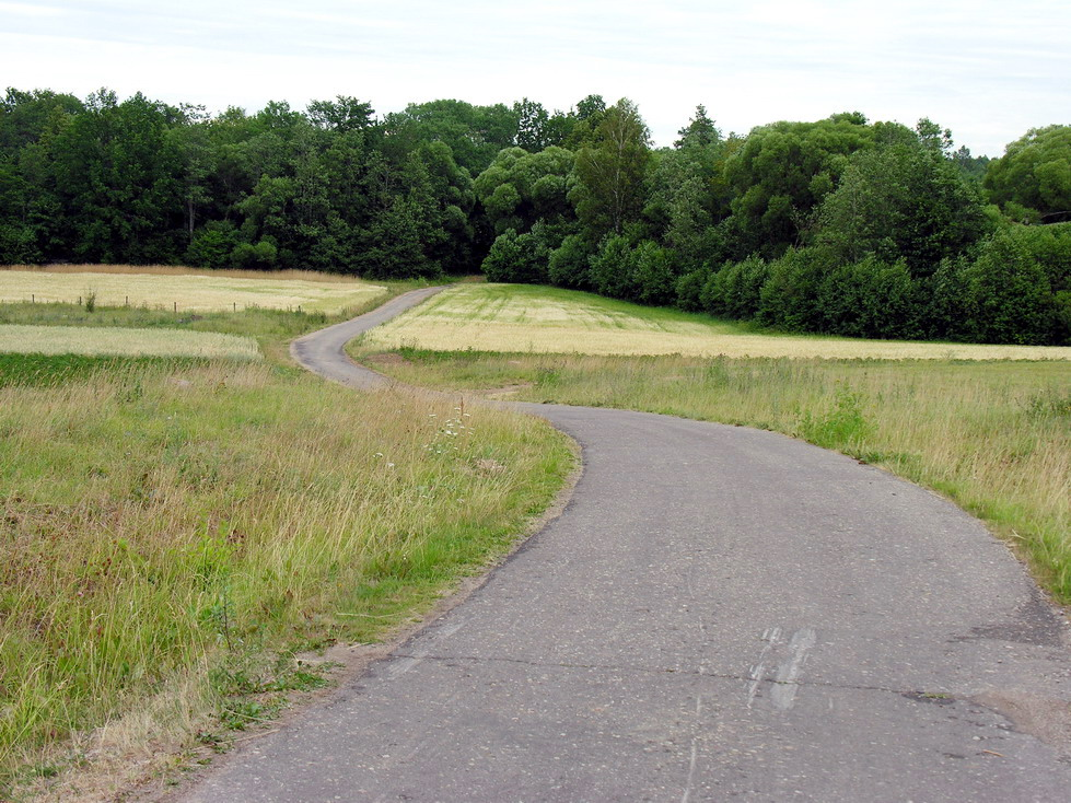 Kelias į Dauginius, Mažeikių raj., Viekšnių sen. Foto: Algirdas, 2006 m. liepos 18 d., Lietuva